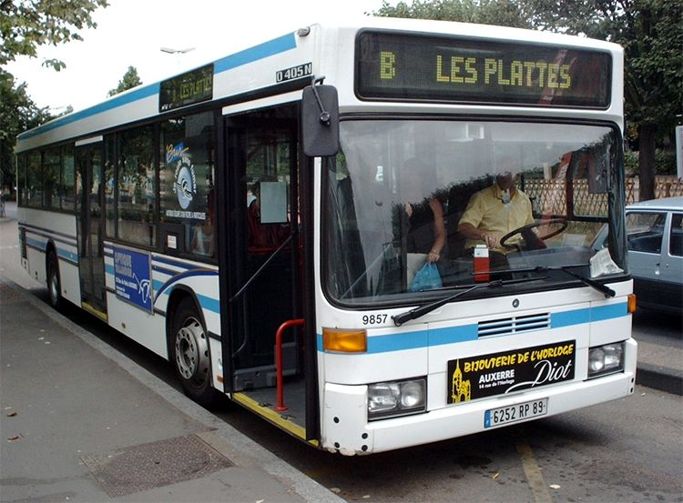 Mercedes-Benz O.405 NK de l'ancien réseau « Le Bus » d'Auxerre. source: Spanish gabacho